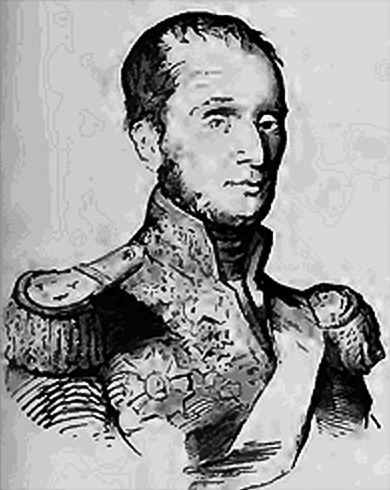 Portrait du vice-amiral Julien Pierre Anne Lalande (1787-1844)